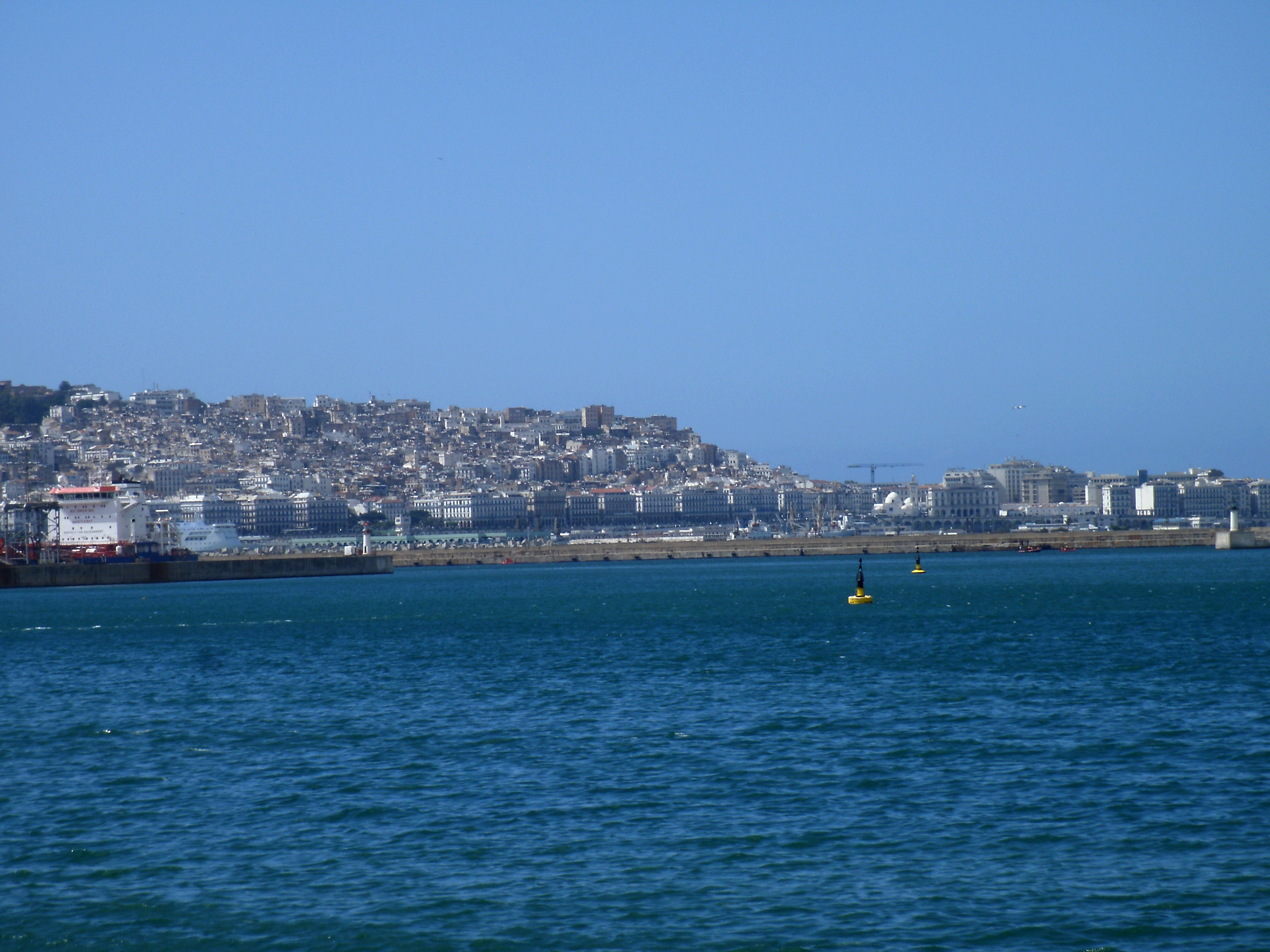 La Casbah vue des Sablettes